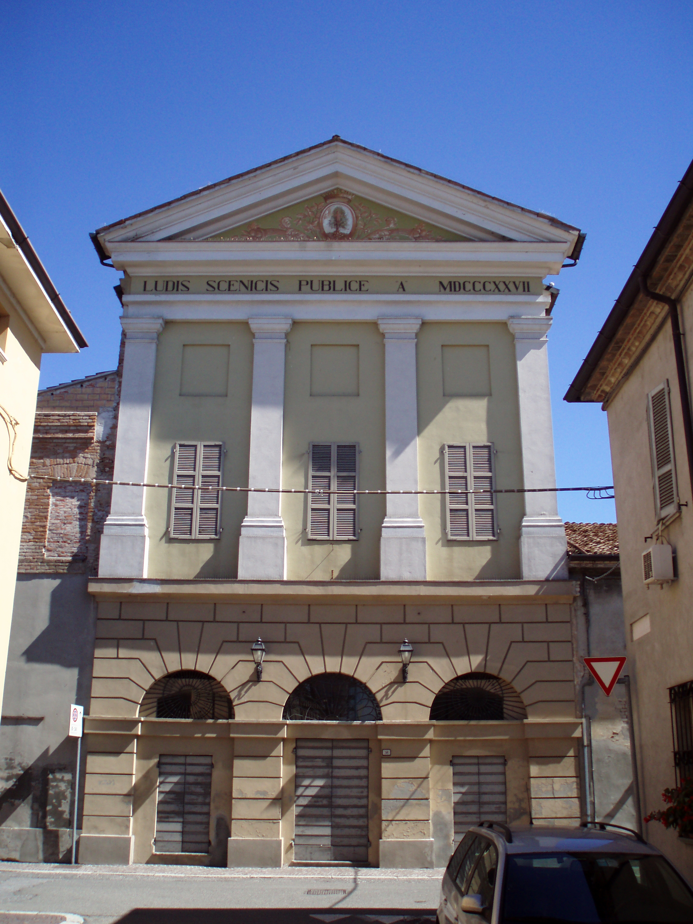 Il teatro "Eleonora Duse" di Cortemaggiore.